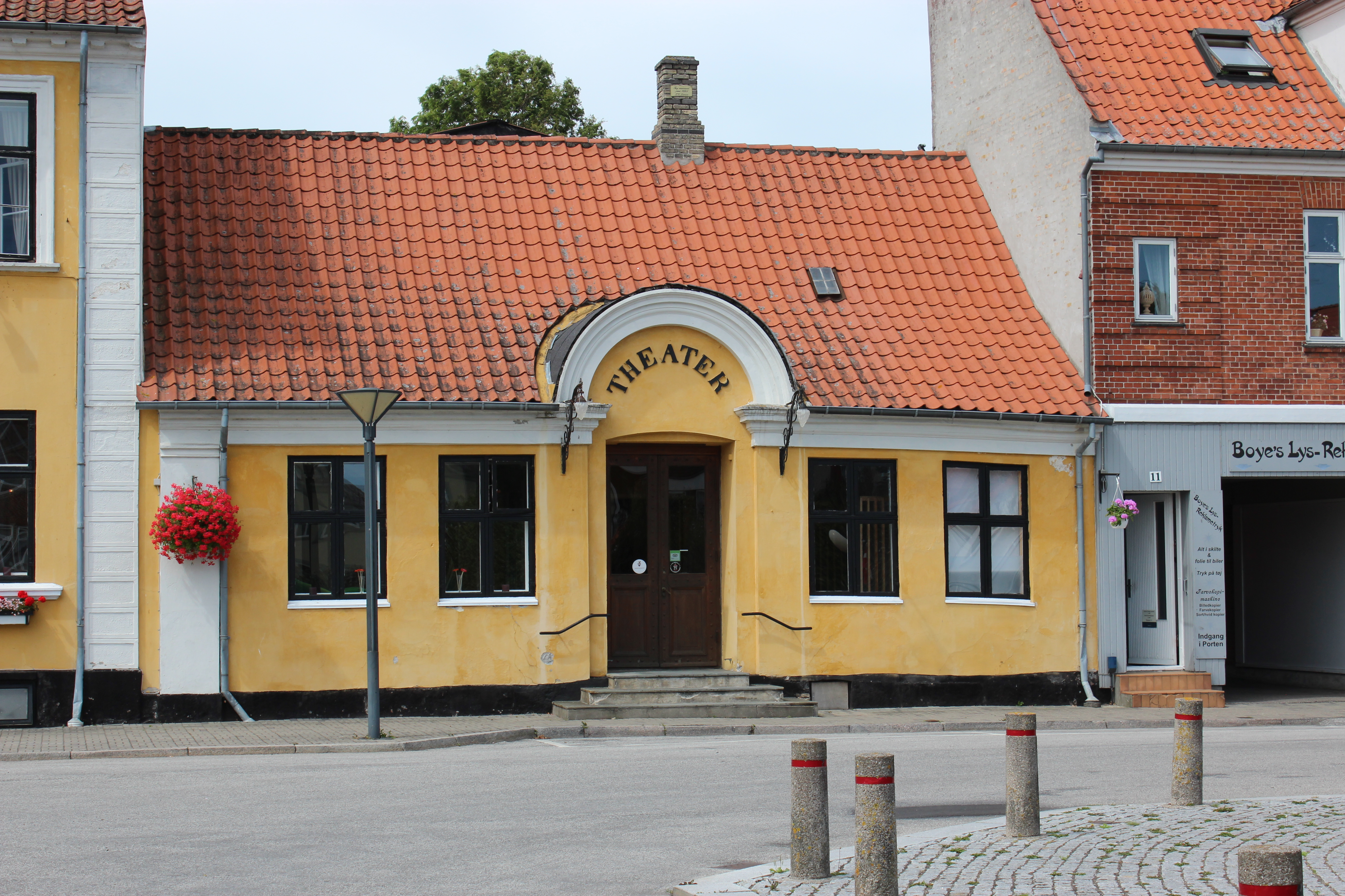 Det tidligere teater i Sakskøbing ved siden af Hotel Saxkjøbing. Bygningen er idag en del af hotellet